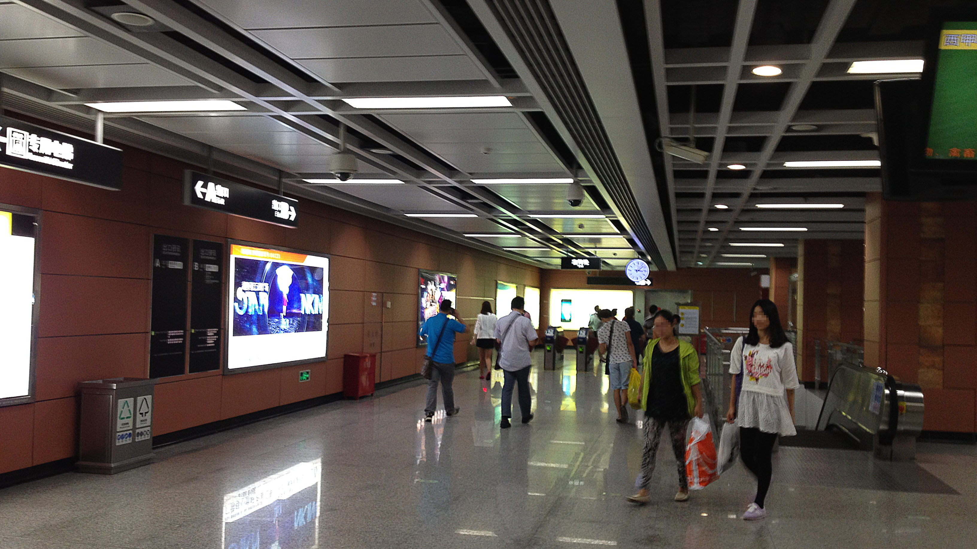 广佛地铁南桂路站站厅